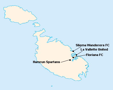 Répartition des clubs en First Division Maltaise 1930-1931.